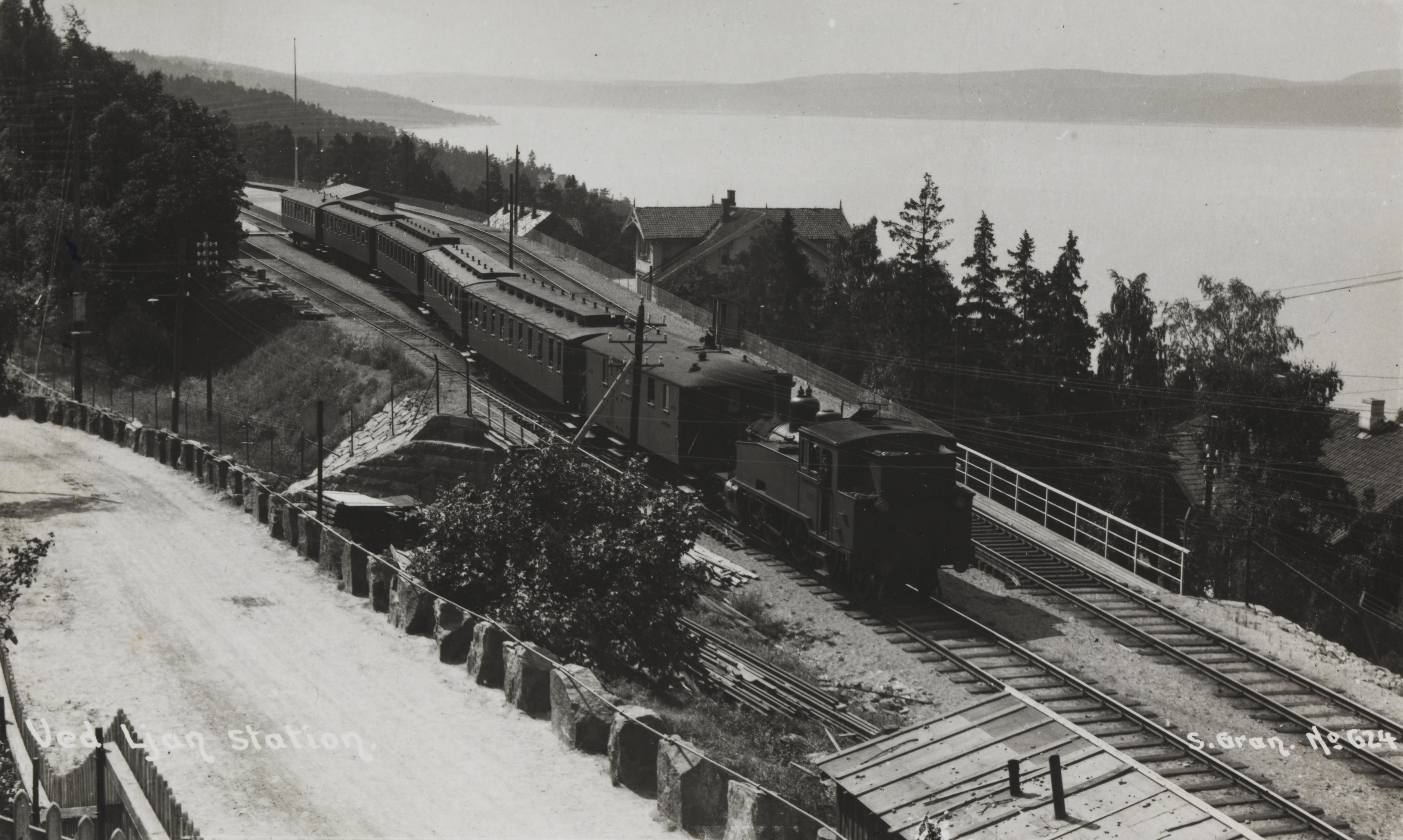 Bildet er hentet fra Nasjonalbibliotekets bildesamling Ljan,Ljan stasjon, Oslo, Oslo